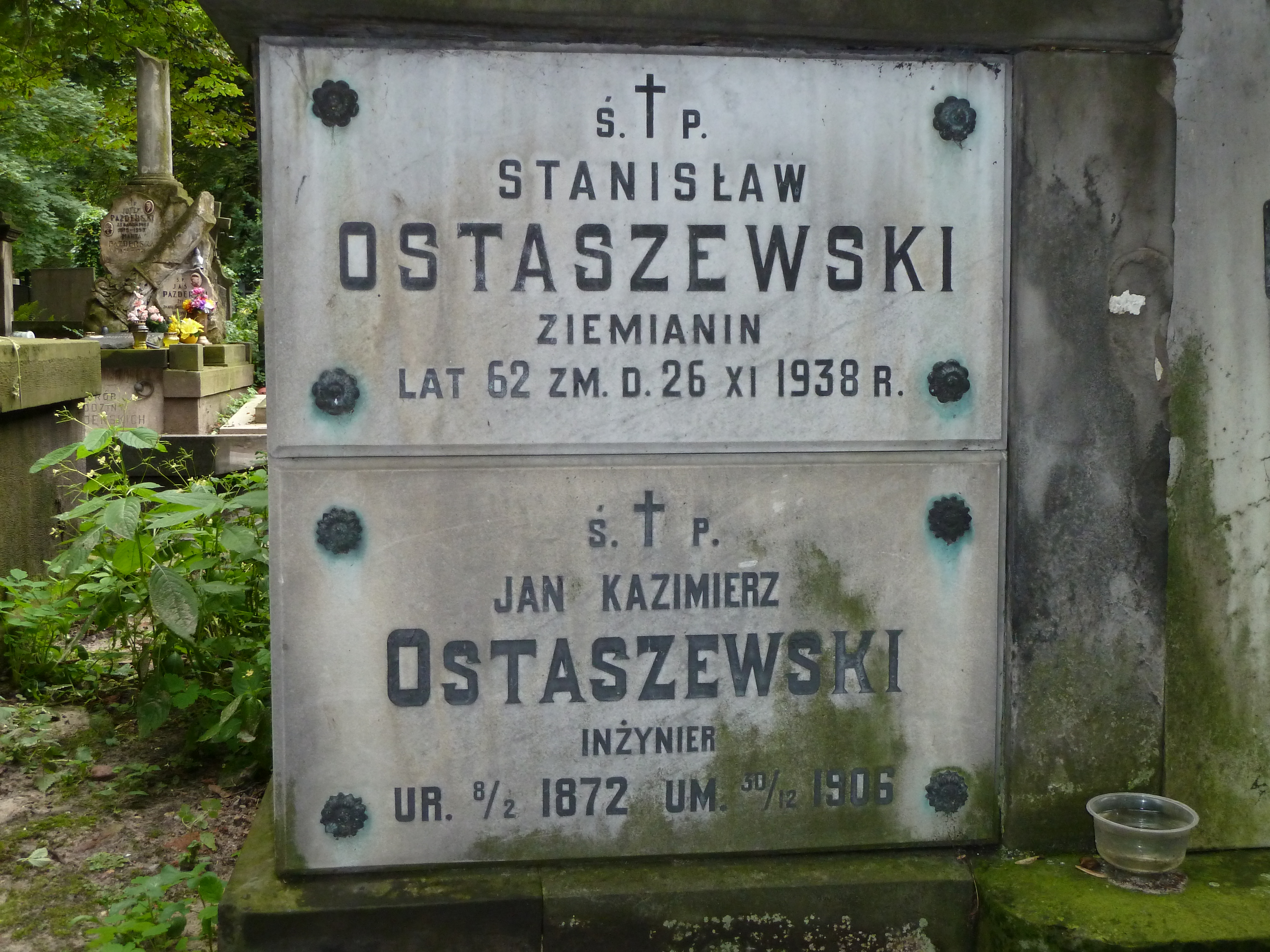 Cmentarz powązkowski w Warszawie, kw 173: Rodzina Antoniego Teodora Ostaszewskiego, inżyniera. Teresa z Gołkowskich Ostaszewska, żyła lat 82, zm. dn. 12 stycznia 1926. Antoni Teodor Ostaszewski, inżynier, ur. 22 XI 1837, zm. 23 XII 1909. Stanisław Ostaszewski, ziemianin, lat 62, zm. d. 26 XI 1938 r. Jan Kazimierz Ostaszewski, inżynier, ur. 8/2 1872, um. 30/12 1906. Antoni Ostaszewski, ur. 28 V 1875, um. 21 VIII 1917. Mieczysław Hipolit Ostaszewski, handlowiec, ur. 12/8 1881, um. 7/10 1910. Ostoja Ostaszewscy: Zygmunt 1902-1974, Magdzia *+1940, Aniela z Leskich 1875-1947, Bronisława 1874-1939.